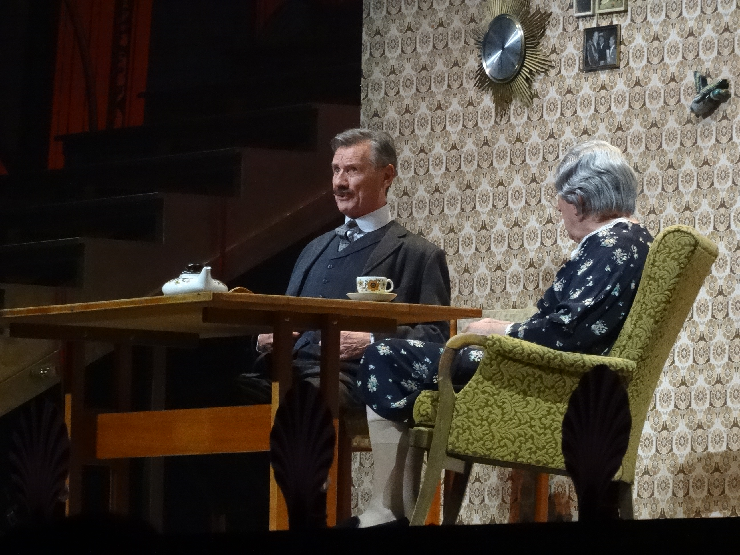 Photo 02-07-14 11 10 37